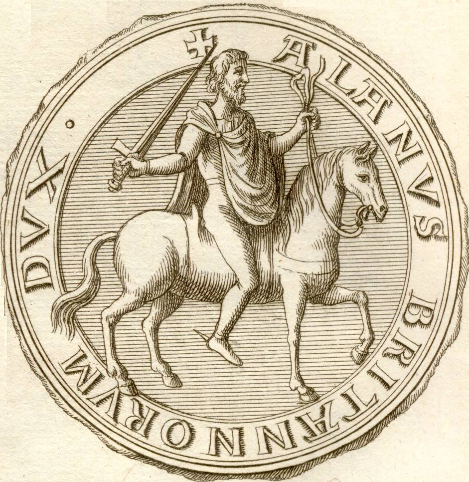 Scan d'un Sceau provenant des "Mémoires pour servir de preuves à l’histoire ecclésiastique et civile de Bretagne, tirés des archives de cette province, des celles de France & d’Angleterre, des Recueils de plusieurs savants Antiquaires, & mis en ordre, par Dom Hyacinthe Morice, Prêtre, Religieux Bénédictin de la Congrégation de S. Maur"